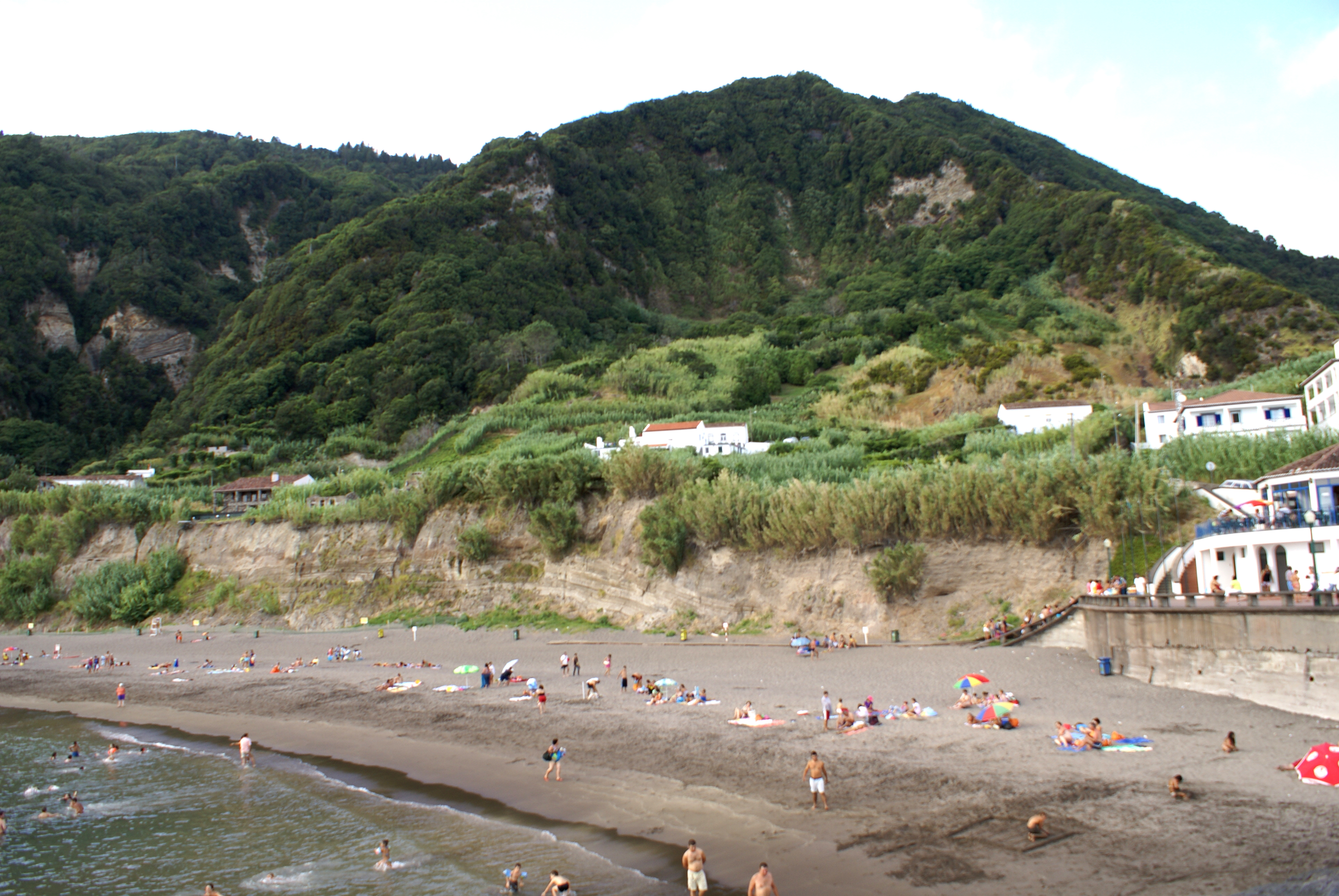 Praia do Fogo, Ribeira Quente, ilha de São Miguel, Açores